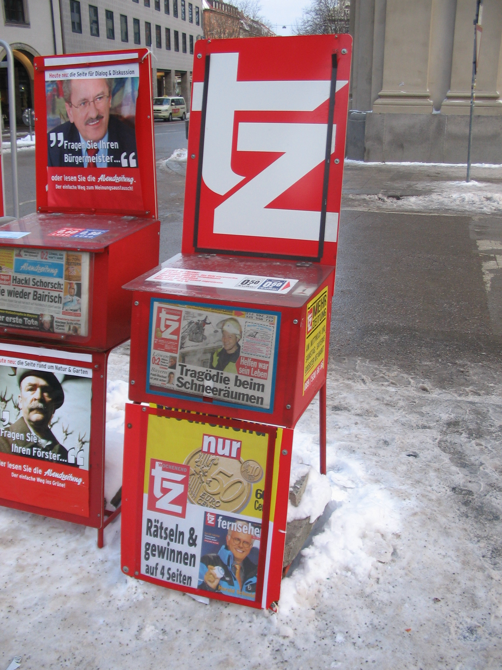 Logo of tz Tageszeitung in Munich